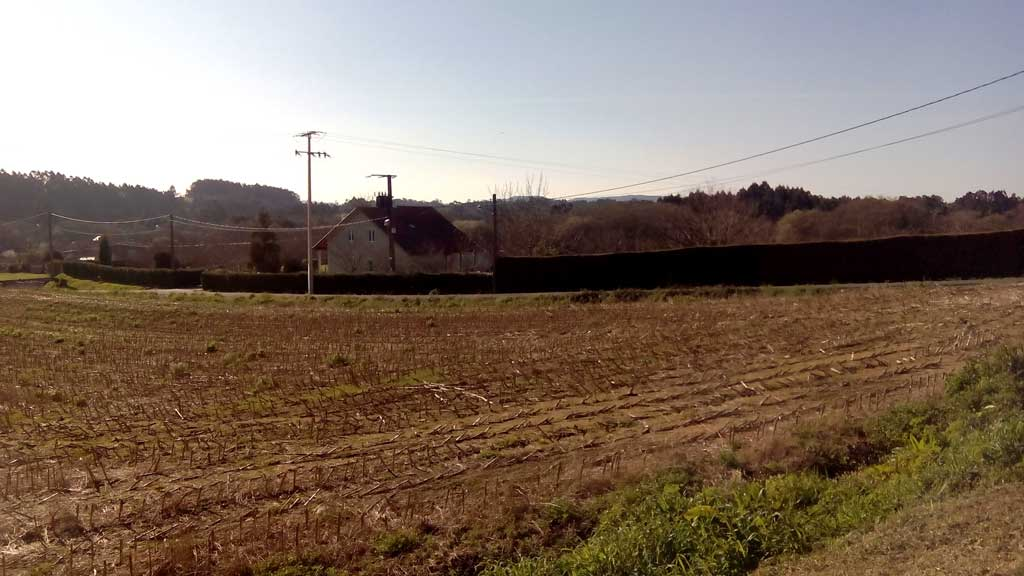 Vista do Pereiro, Sedes.